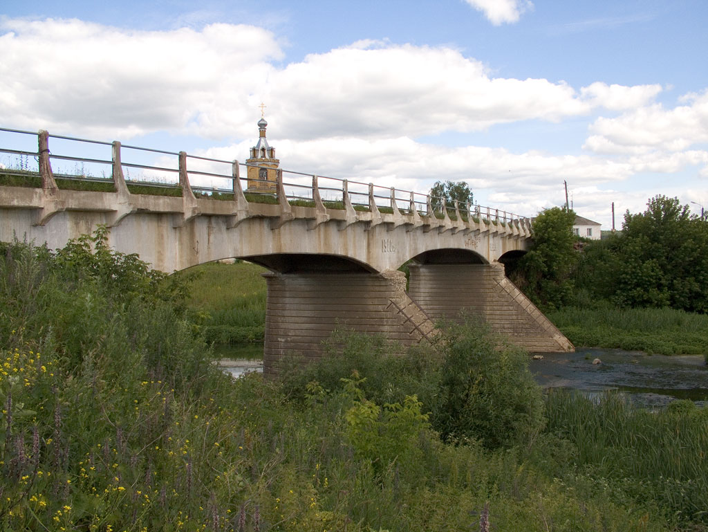 Цивильский мост Монолитный железобетонный мост Цивильска